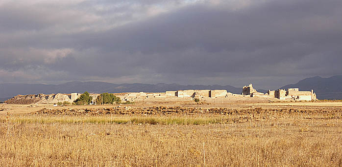 Calatrava la Vieja 1. Castillo. Ciudad Real. España. Vista desde el sur